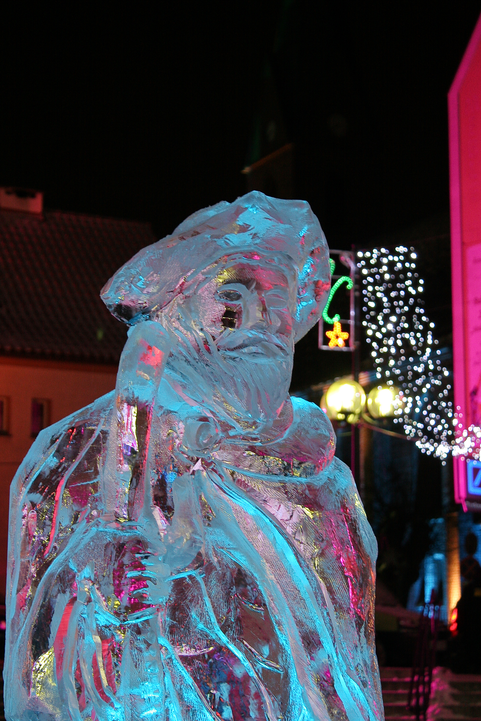 Figura św. Jakuba wyrzeźbiona w bryle lodu